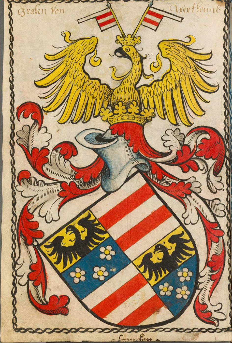 Scheibler'sches Wappenbuch , älterer Teil Franken Grafen von Wertheim